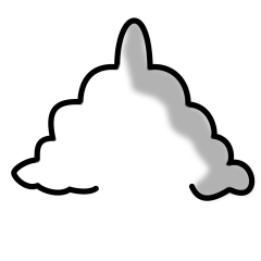 Esquisse ultra-minimaliste du personnage Alice dans Dilbert de Scott Adams.